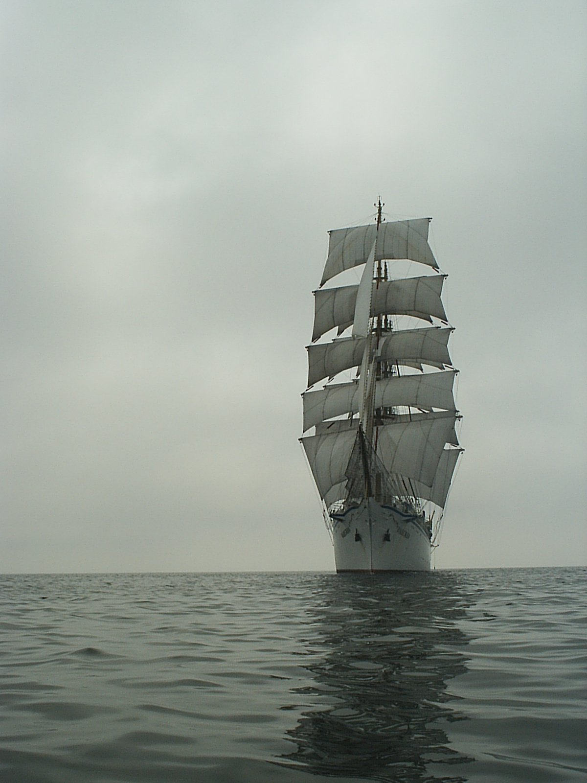 Nadieżna